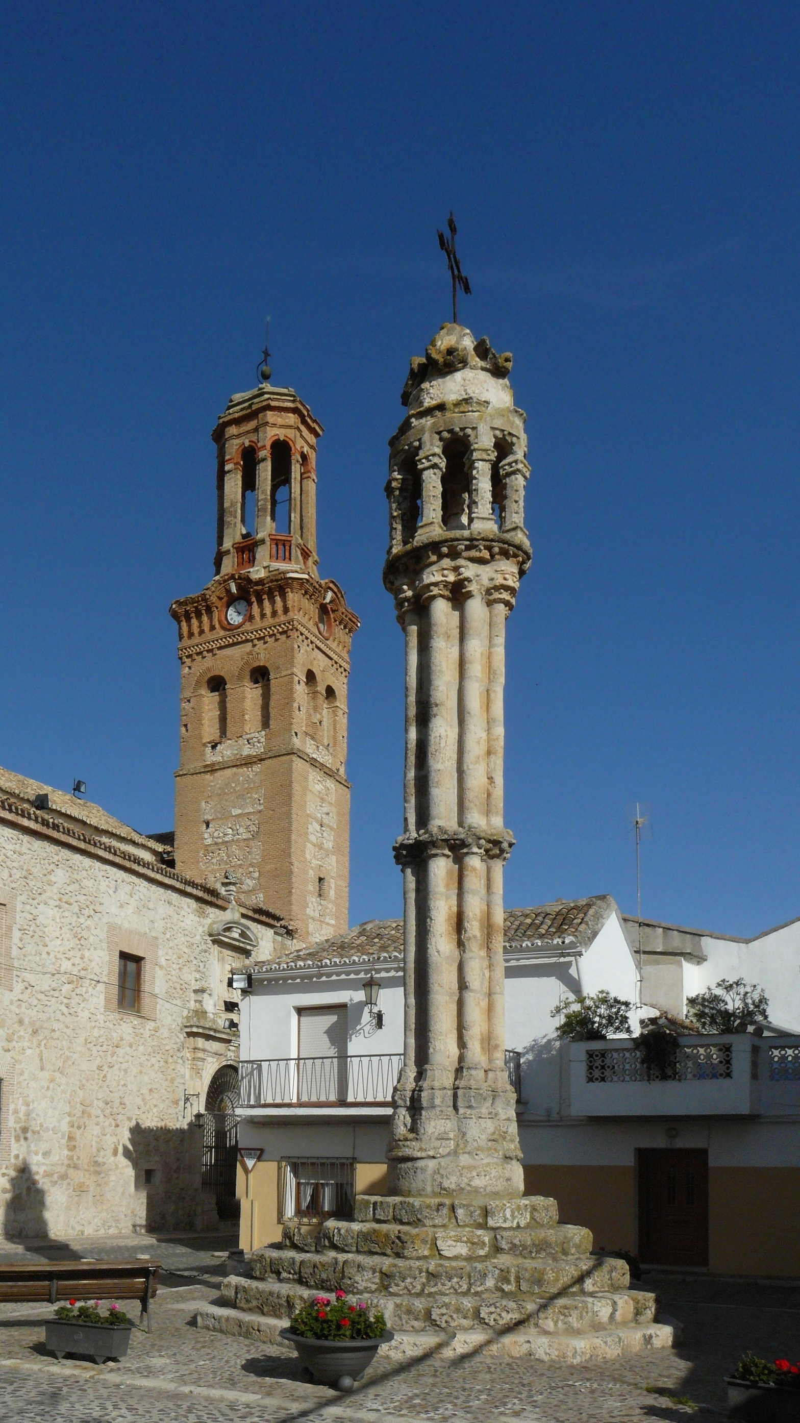 Rollo gótico de Ocaña y torre mudejar del antiguo Colegio de los Jesuitas.